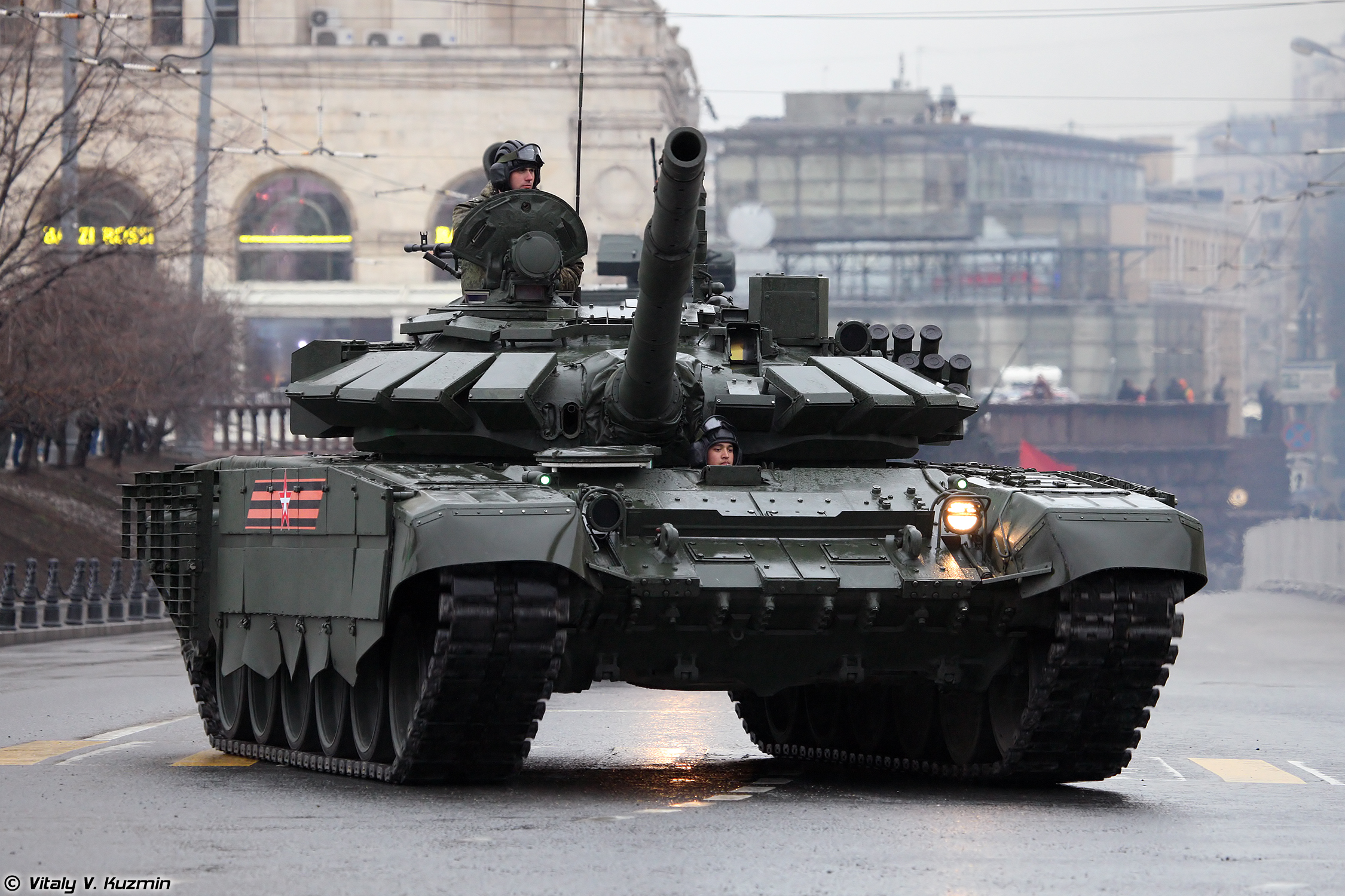 Модернизированный Т-72Б3 с дополнительной защитой (Modernized T-72B3 with additional armor)